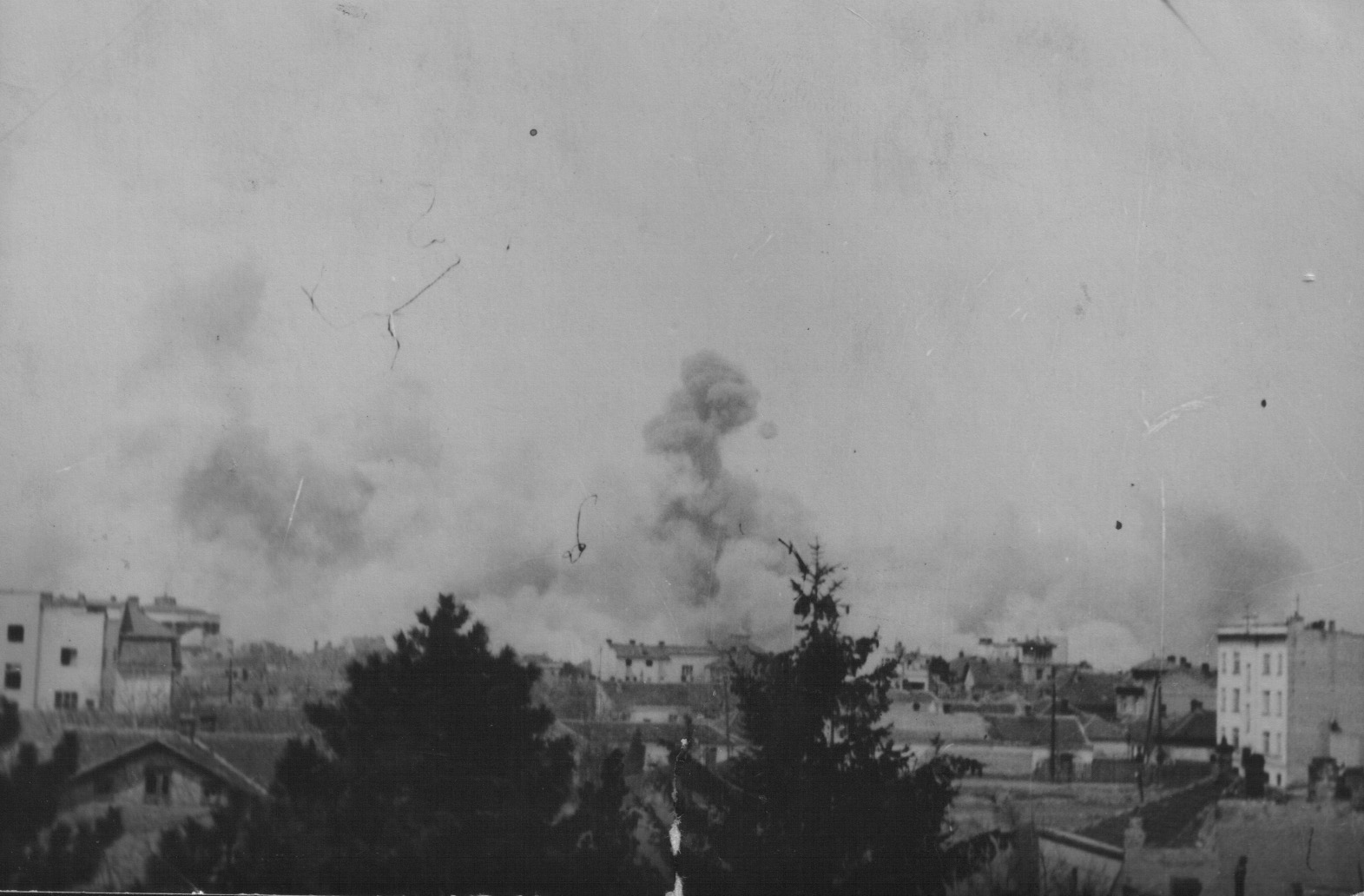 Srpskohrvatski / српскохрватски: Savezničko bombardovanje nemačkih položaja u Beogradu 1944. godine.